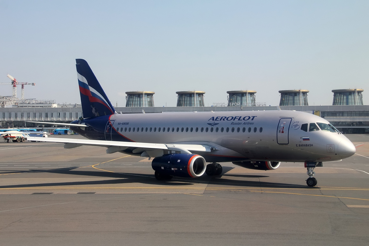 Aeroflot Sukhoi Superjet 100-95